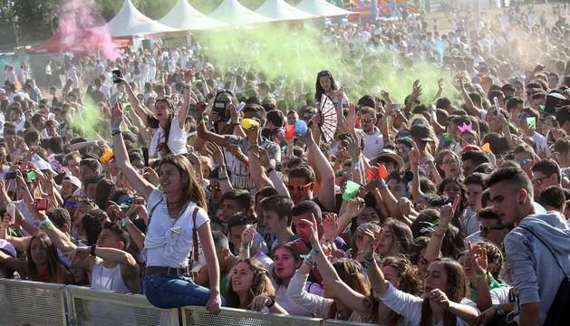 Más de 9.000 personas en el estadio Ombatillo para disfrutar con una treintena de artistas nacionales e internacionales de música electrónica, reggaetón y hip-hop.